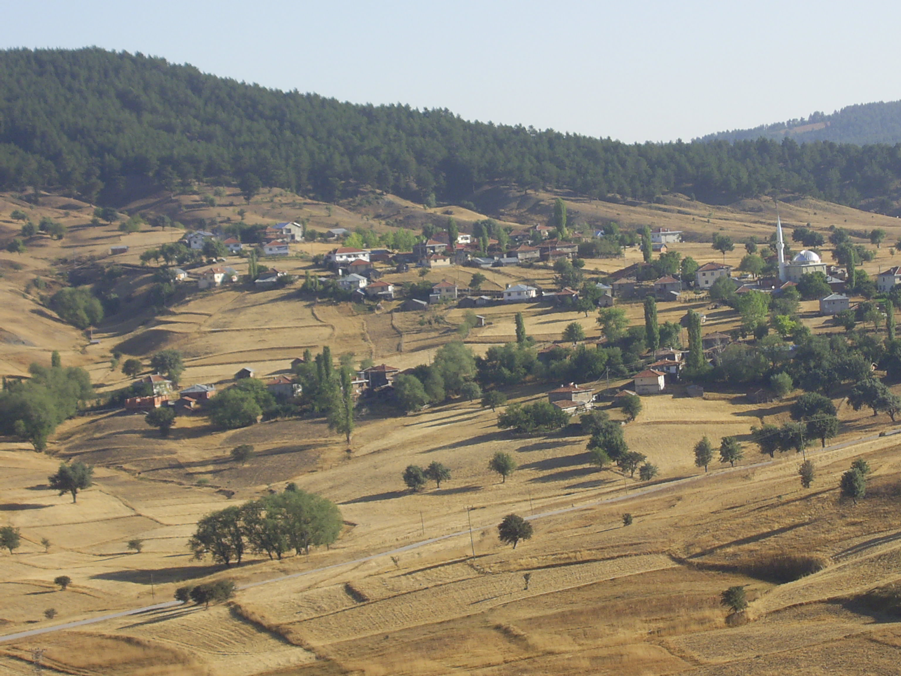 Kilkuyu, Tosya , Kastamonu